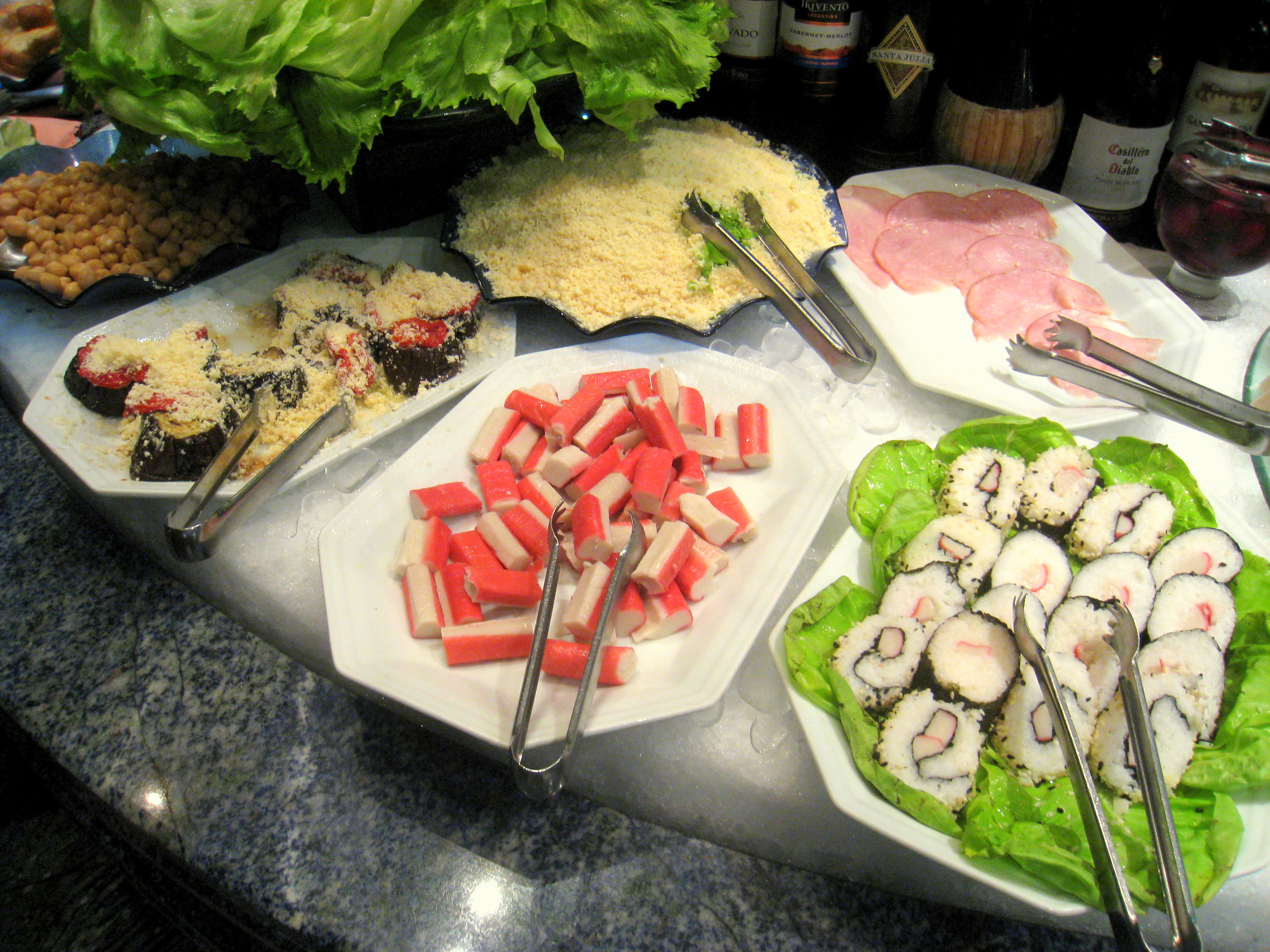 Cuisine of Brazil - Campinas, SP, Brazil.